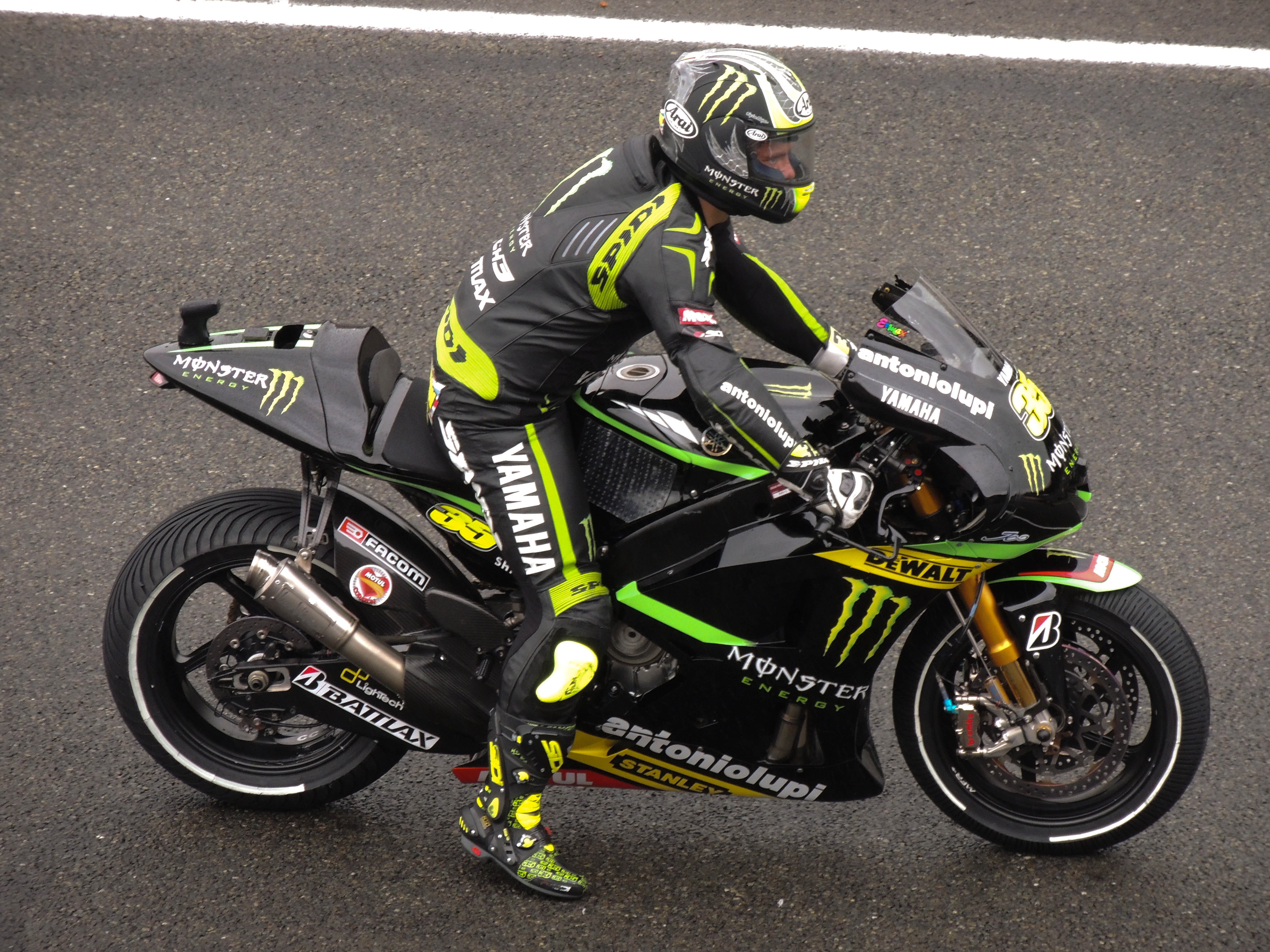 Cal Crutchlow sur la grille de départ du grand prix de France moto au Mans en 2013.